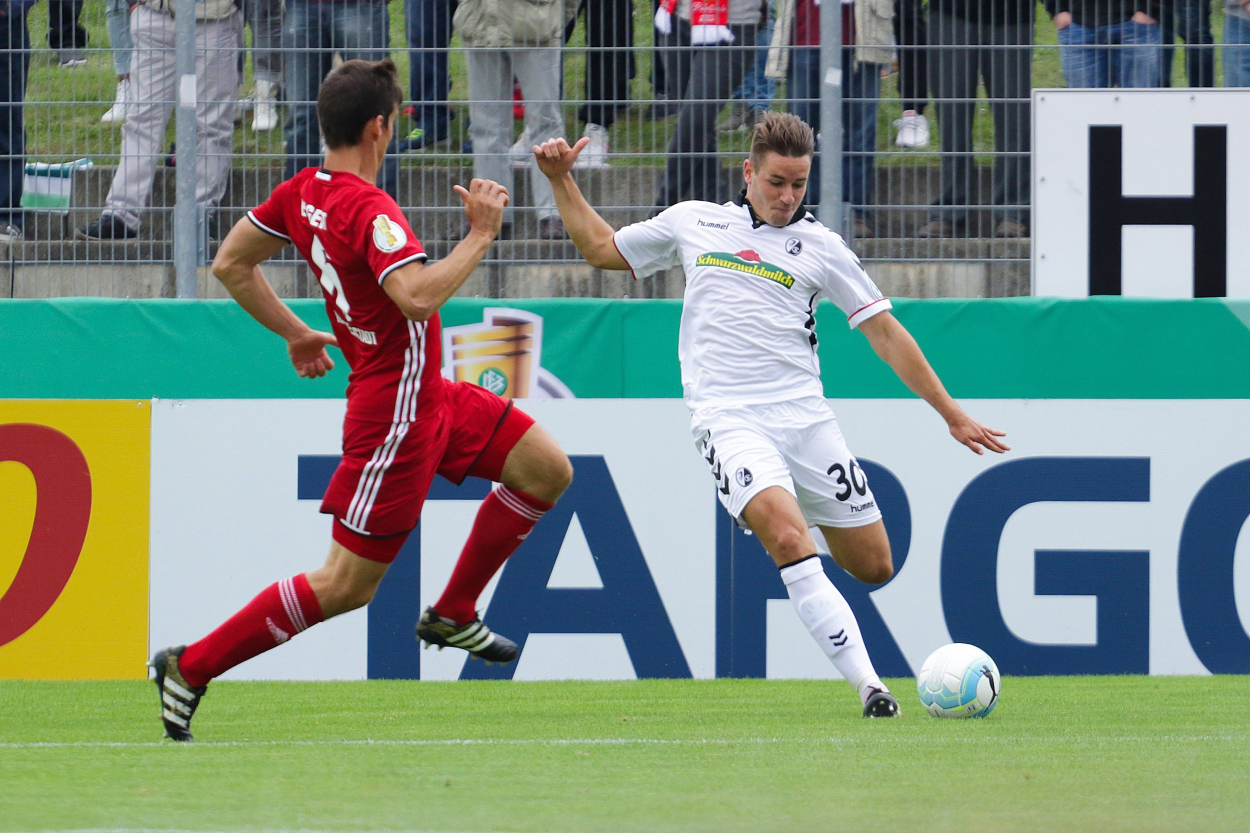 Christian Günter beim DFB-Pokalspiel VfB Germania Halberstadt vs. SC Freiburg